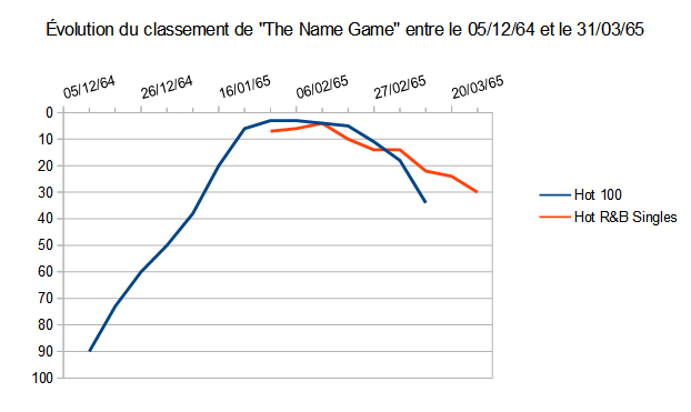 Évolution du classement du single The Name Game de Shirley Ellis entre le 05/12/64 et le 31/03/65.